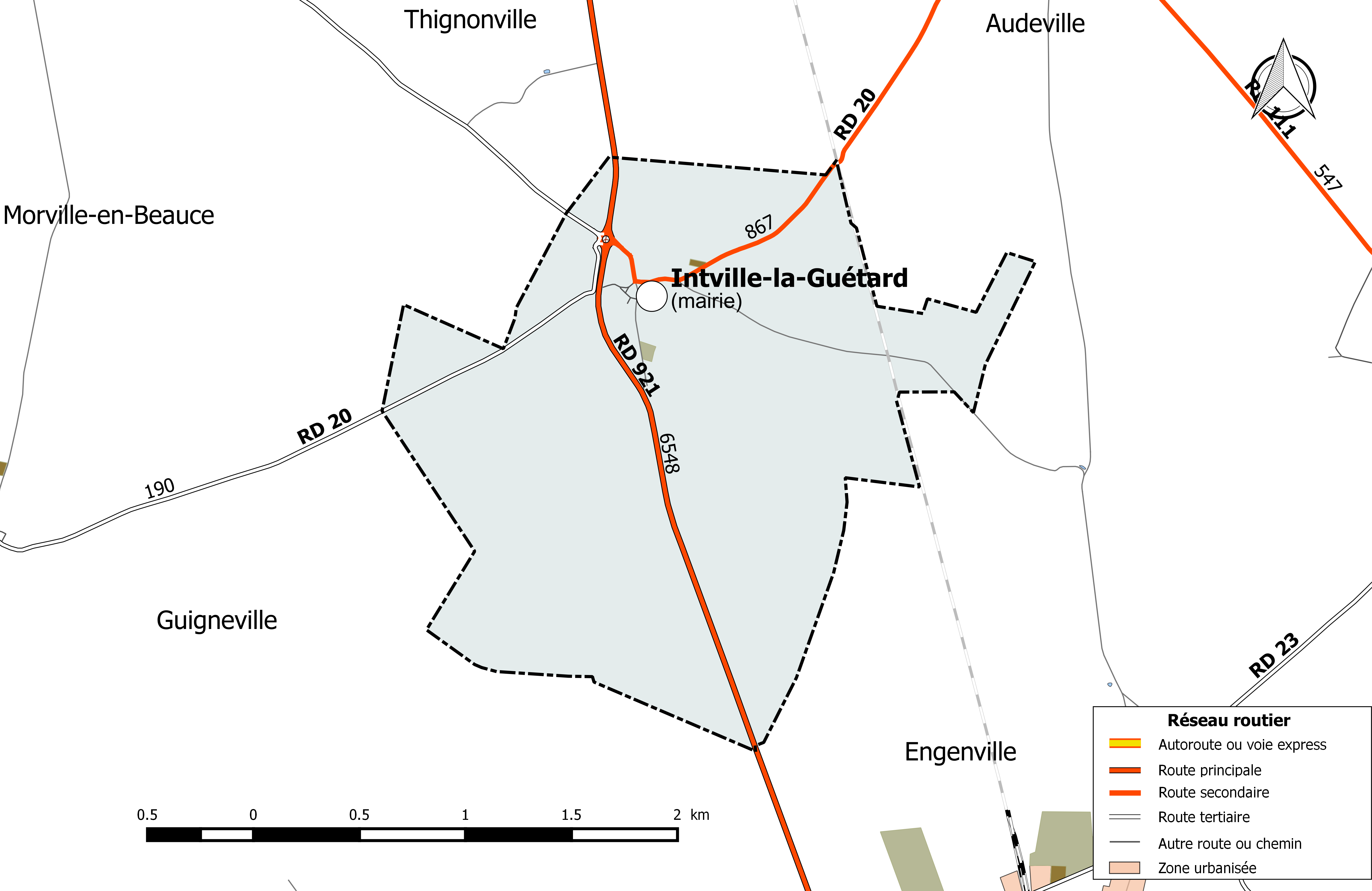 Carte du réseau routier de la commune de Intville-la-Guétard.